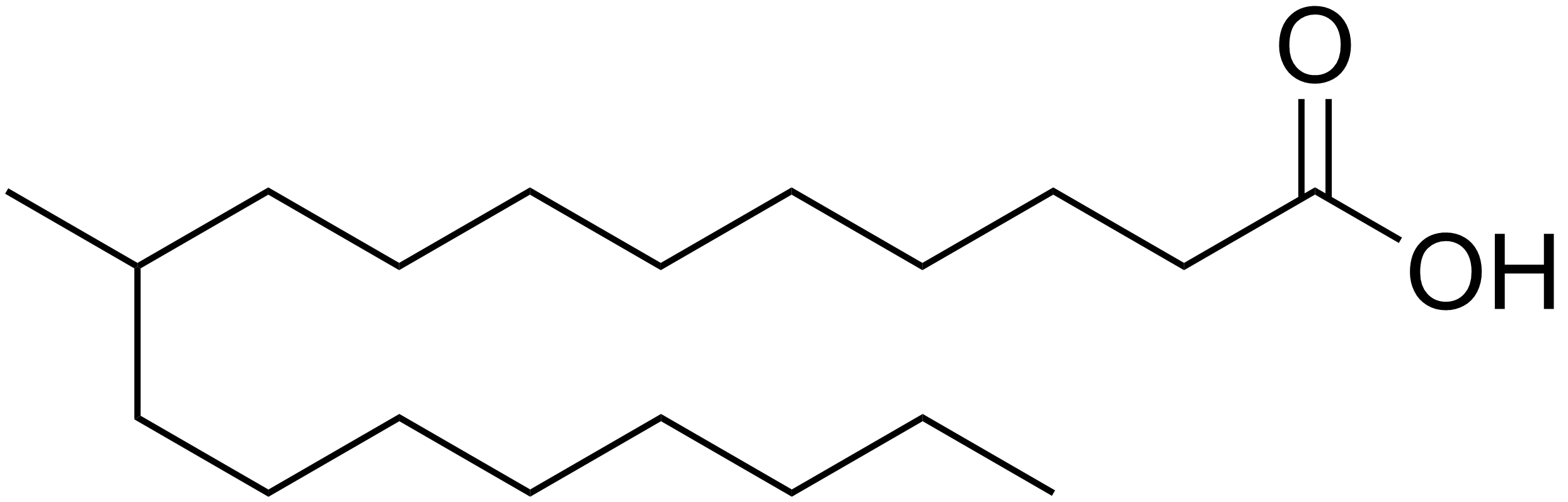 chemical structure of Tuberculostearic acid